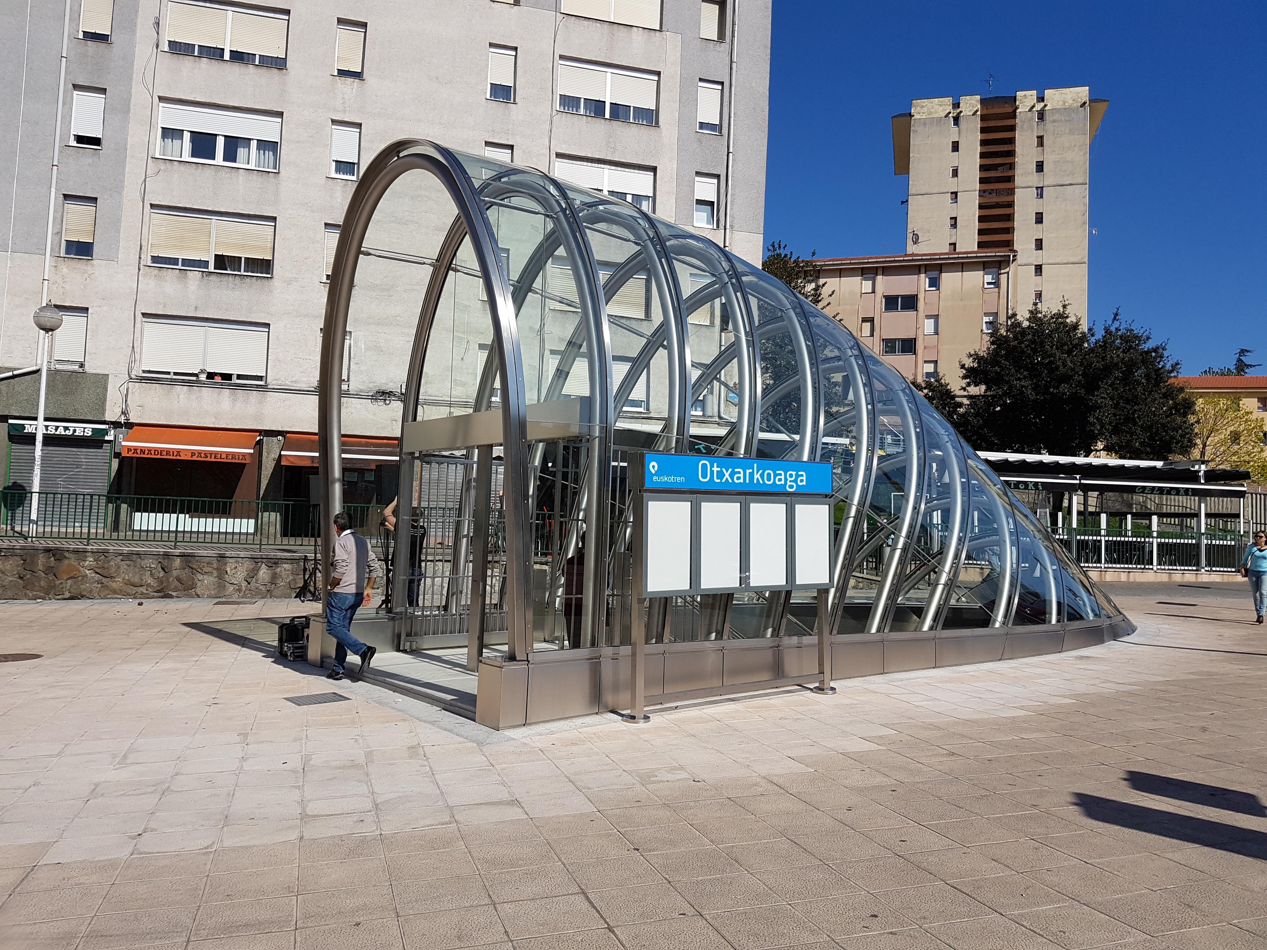 Fosterito de la estación de Otxarkoaga.